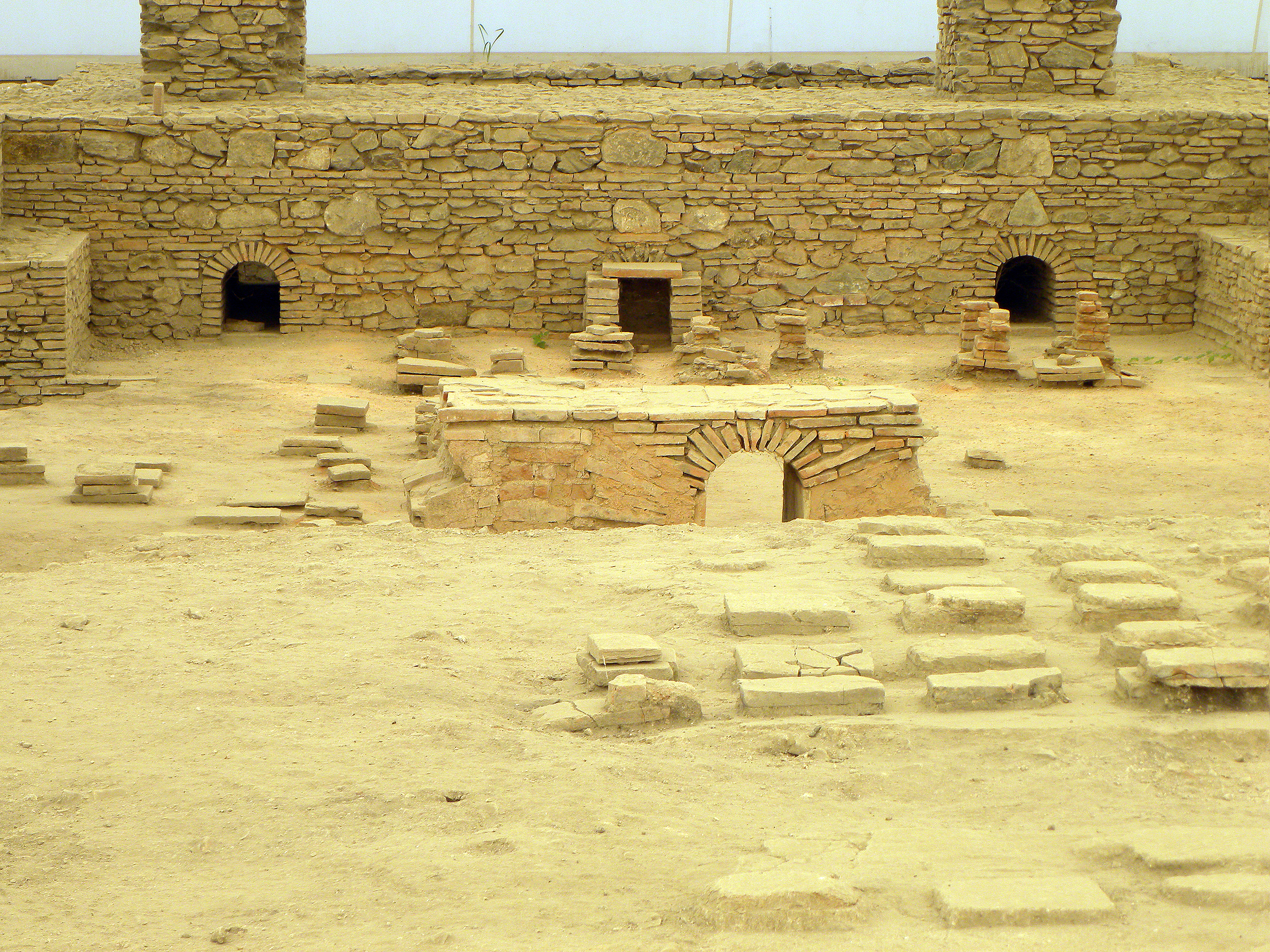 Viminacijum